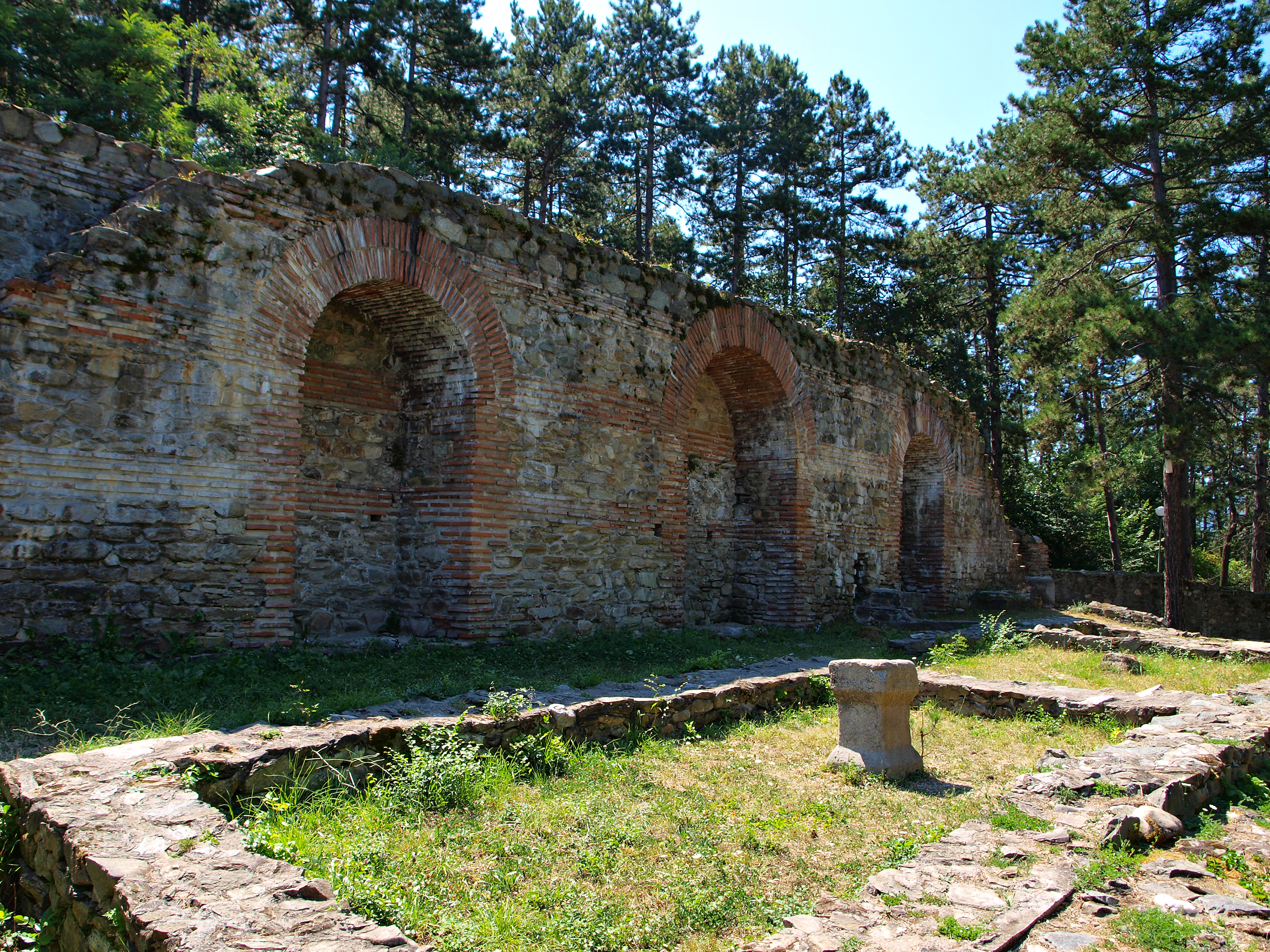 Hisarlaka medieval fortress in Kyustendil, Bulgaria